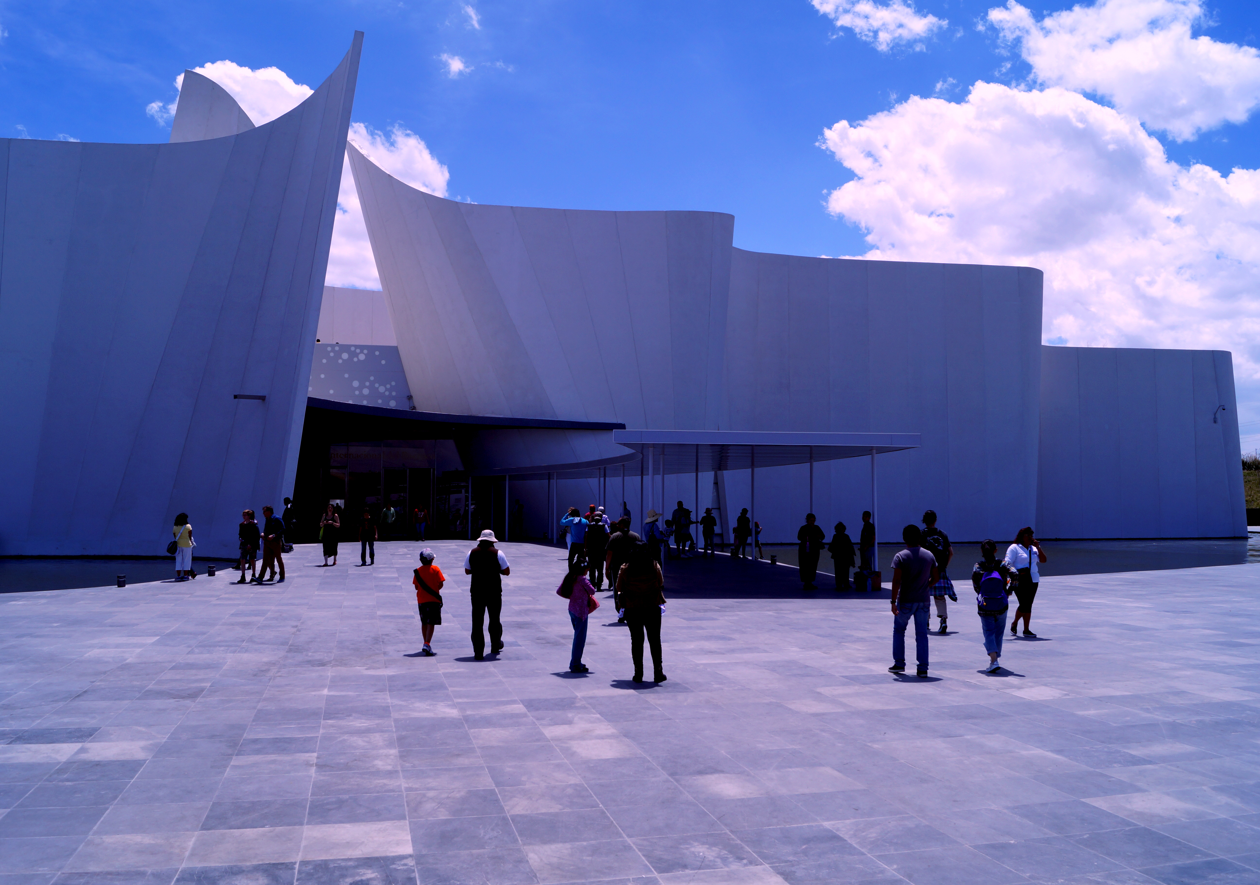 Fachada del Museo Internacional del Barroco, inaugurado el 4 de febrero de 2016 en la ciudad de Puebla, México. El edificio fue diseñado por el arquitecto japonés Toyoo Itō.